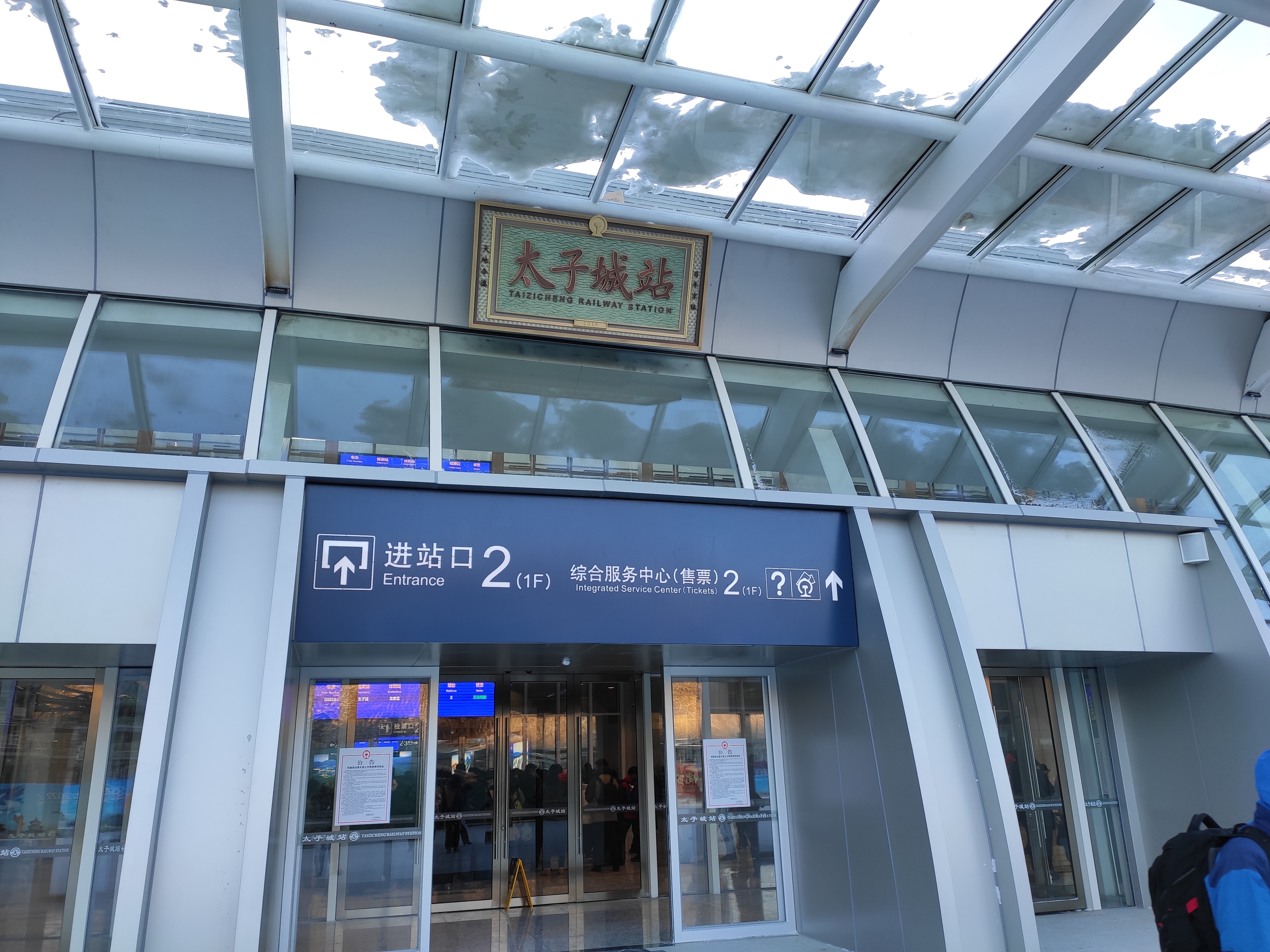 中文（中国大陆）: 太子城站。